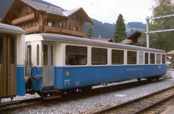 Der AB 98 der Montreux–Berner Oberland-Bahn abgestellt in Zweisimmen.